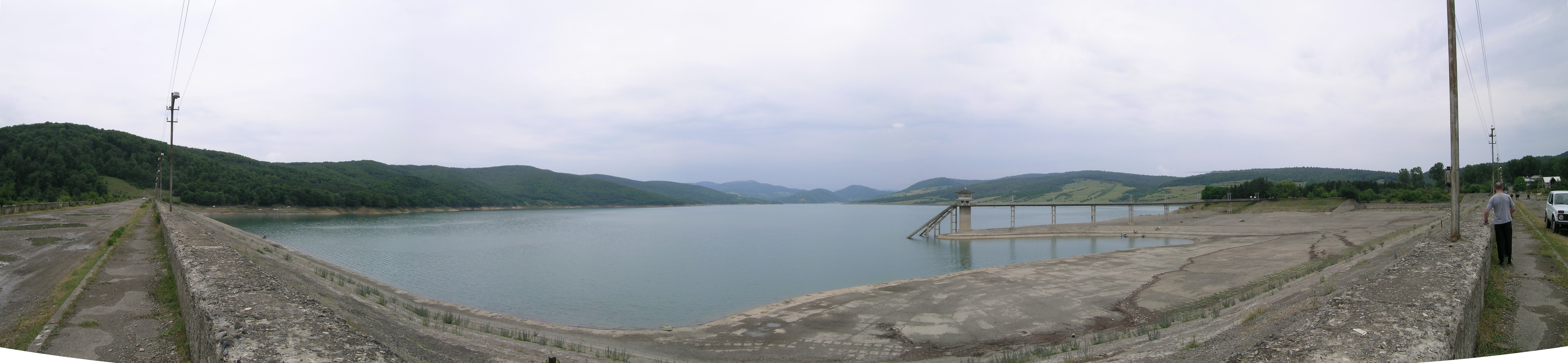 Sioni water reservoir